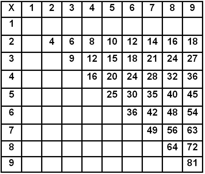 שינון לוח הכפל על ידי 36 מכפלות. רישיון נוצר על ידי משתמש:Yoavabadi